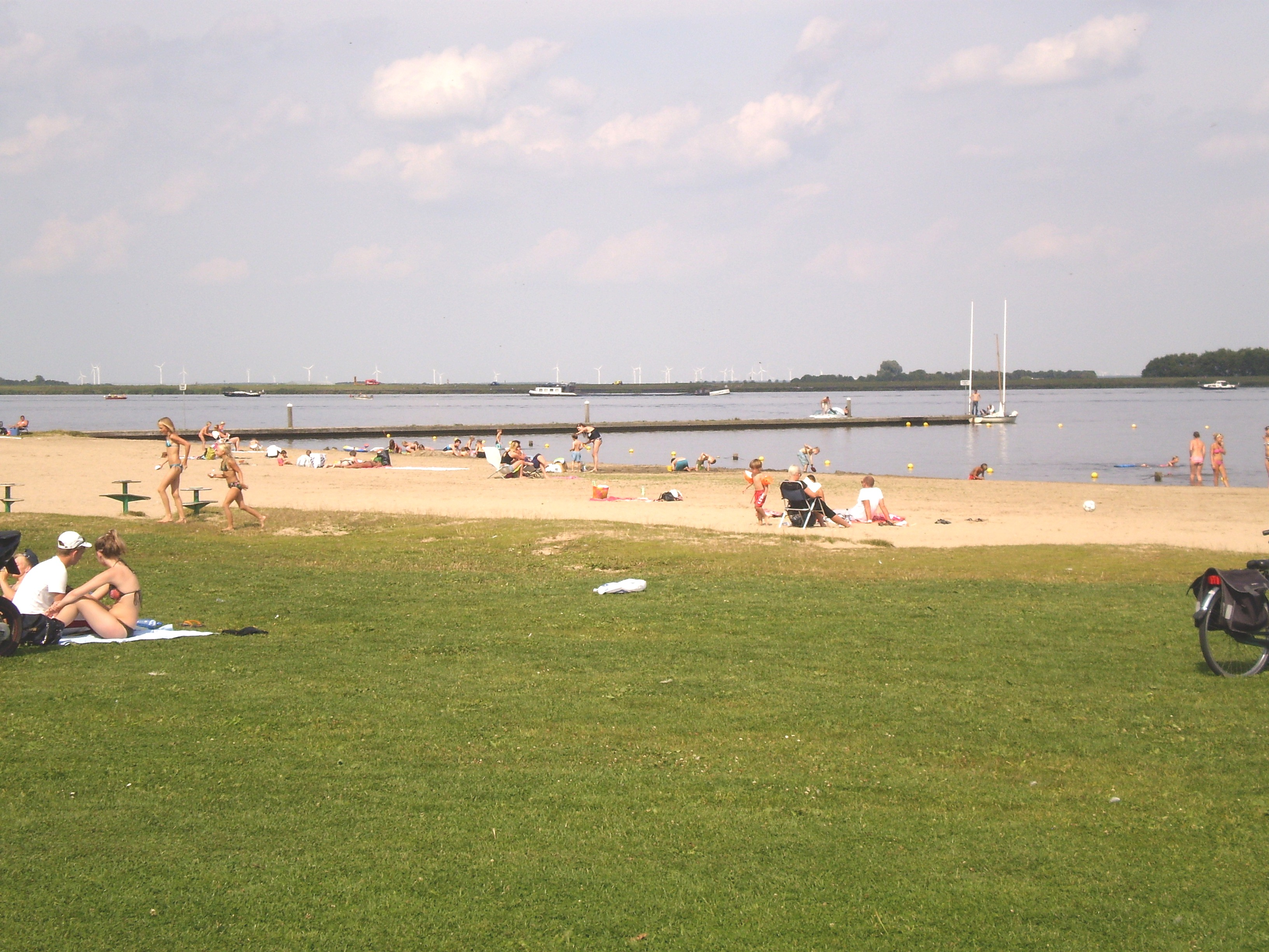 Ofbyld oanbean troch Swarte Kees op 20 augustus 2009